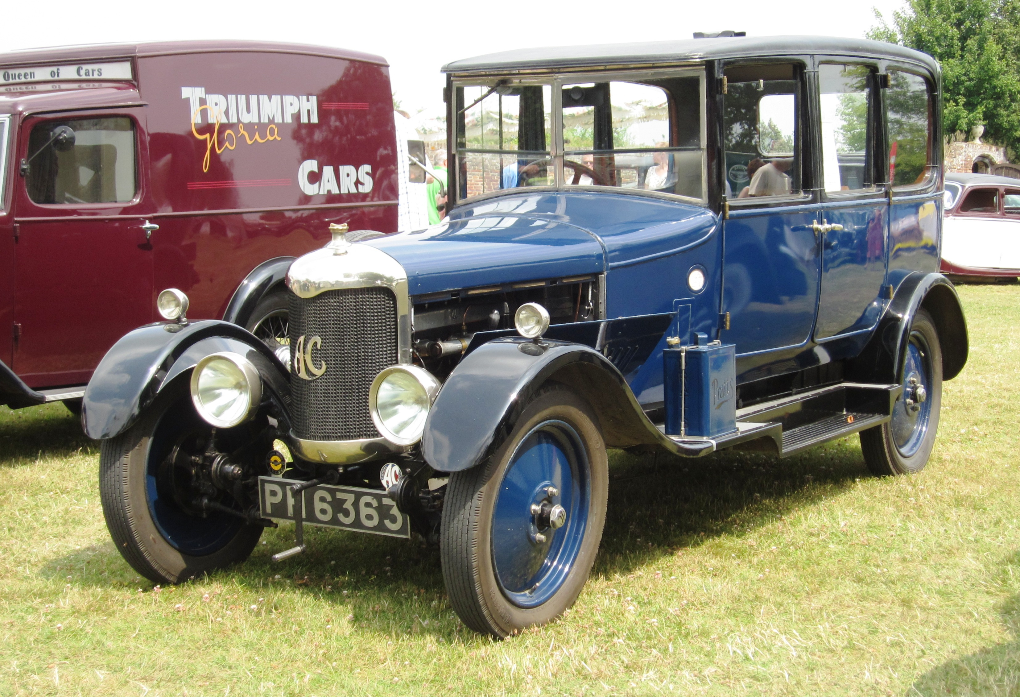 AC Royal berline 1927 1991cc